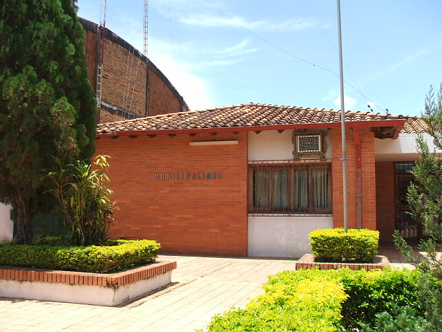 fachada